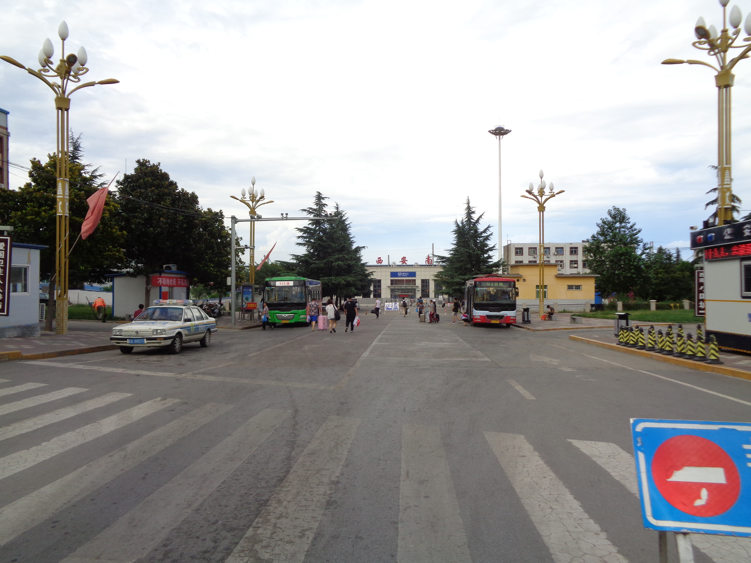 西安市长安区引镇街道西安南站实景